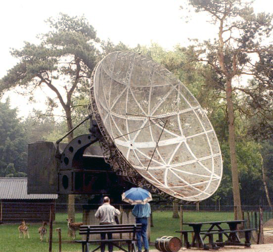 Der "Würzburg-Riese" - deutsche Radaranlage FuMG 65 im Kriegs- und Widerstandskämpfermuseum der Niederlande (Overloon)